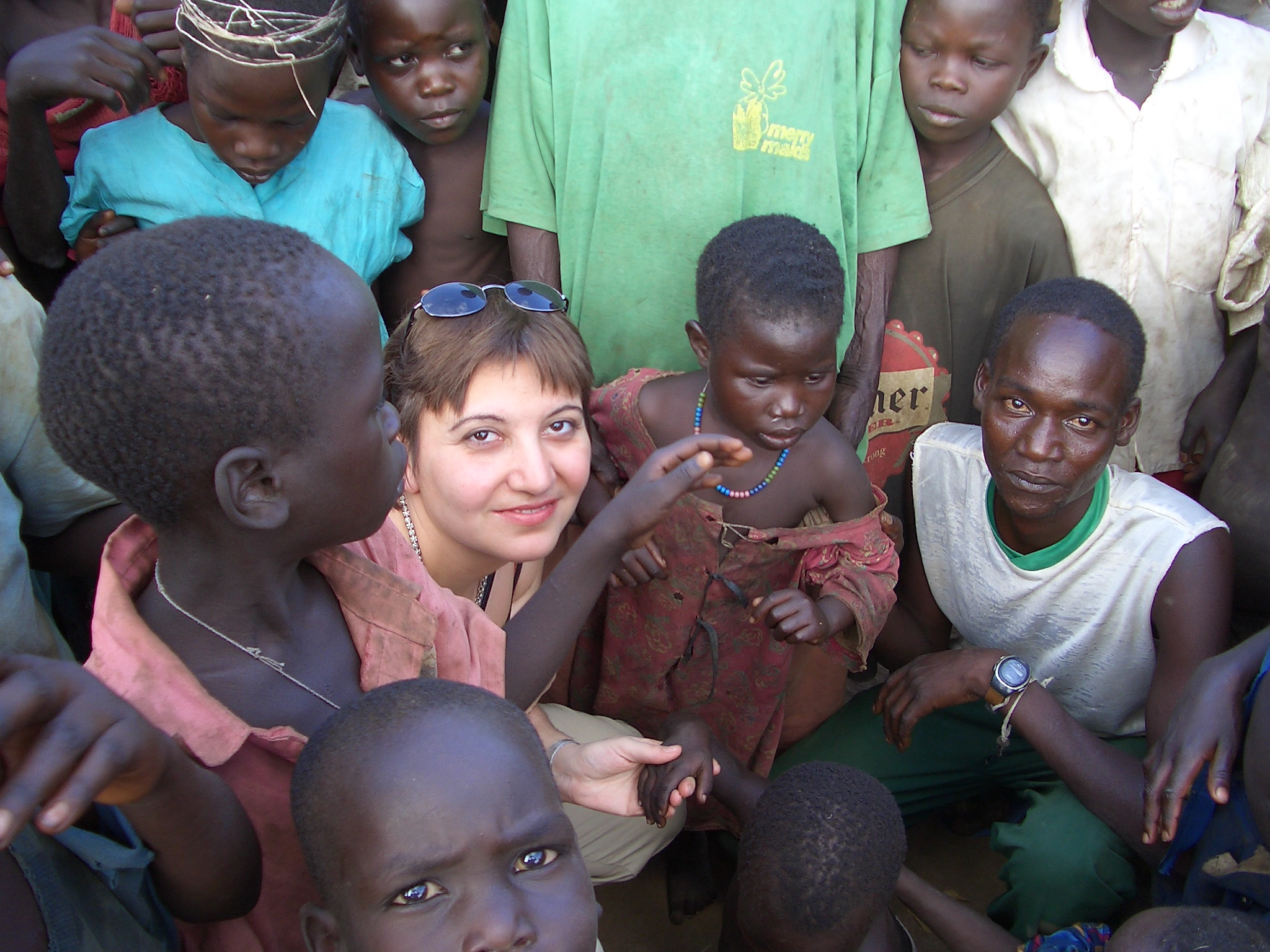 Ekin Deligöz, deutsche Politikerin (Bündnis90/Die Grünen), in Funktion als UNICEF-Vorstandsmitglied in Uganda.